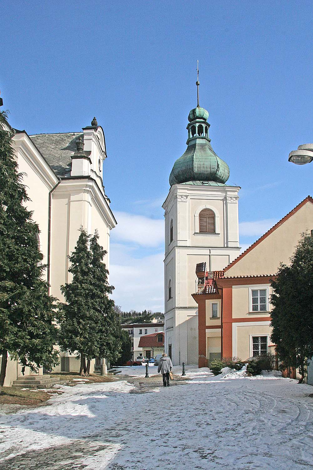 Česky: Choceň, ulice Mistra Choceňského, kostel svatého Františka Serafínského. - OpenStreetMap(Info)